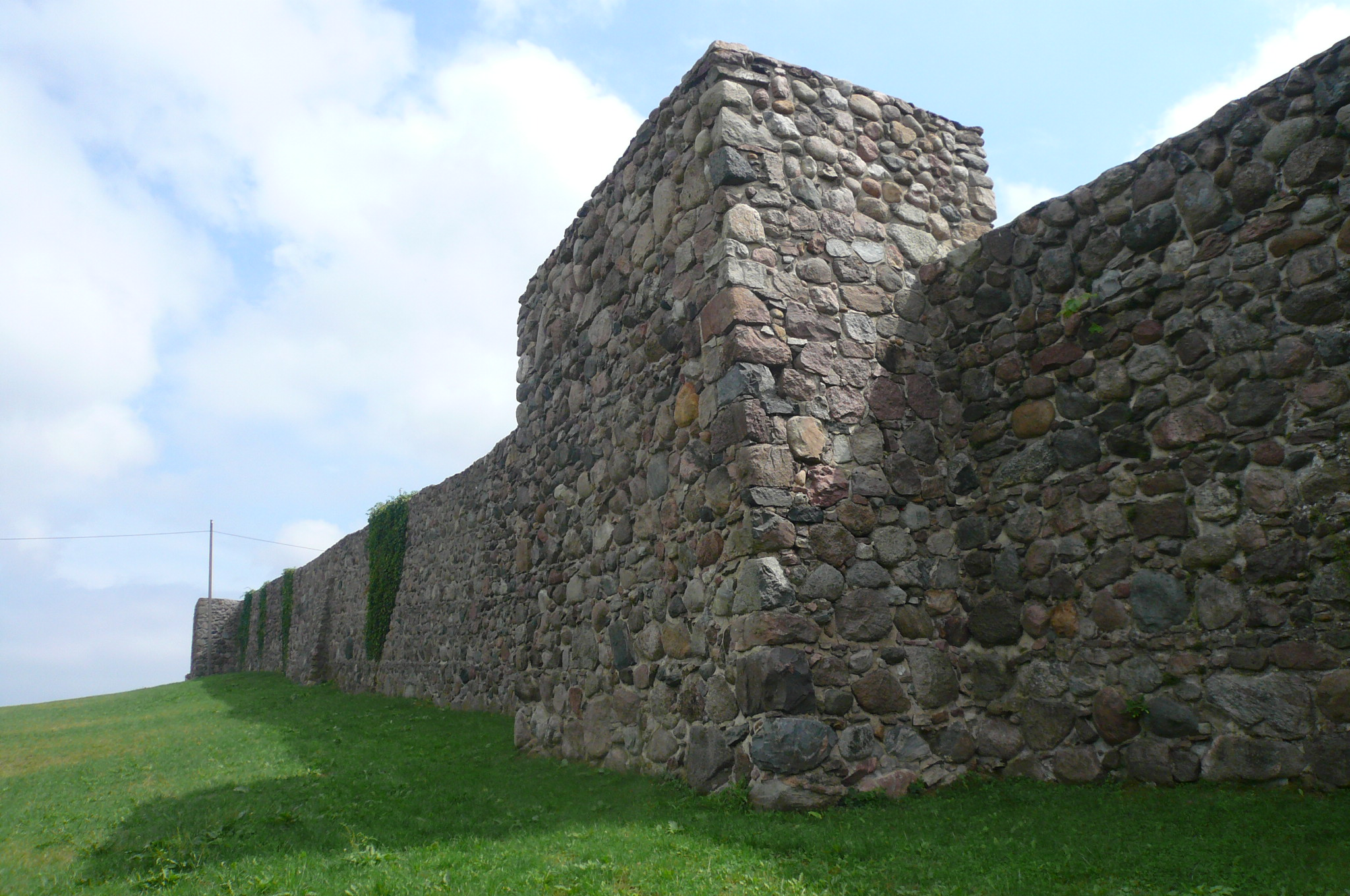 Mury miejskie Morynia